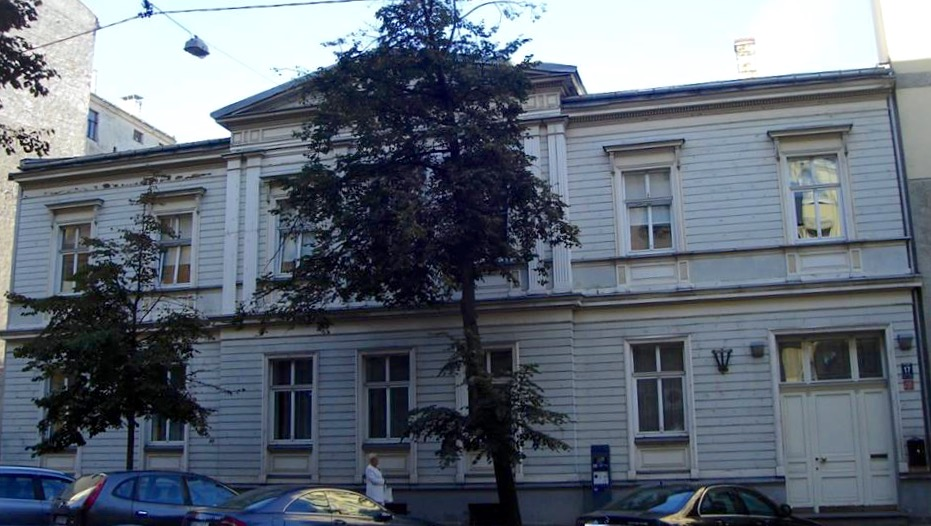 Dzīvojamā ēka, Rīga, Stabu iela 17